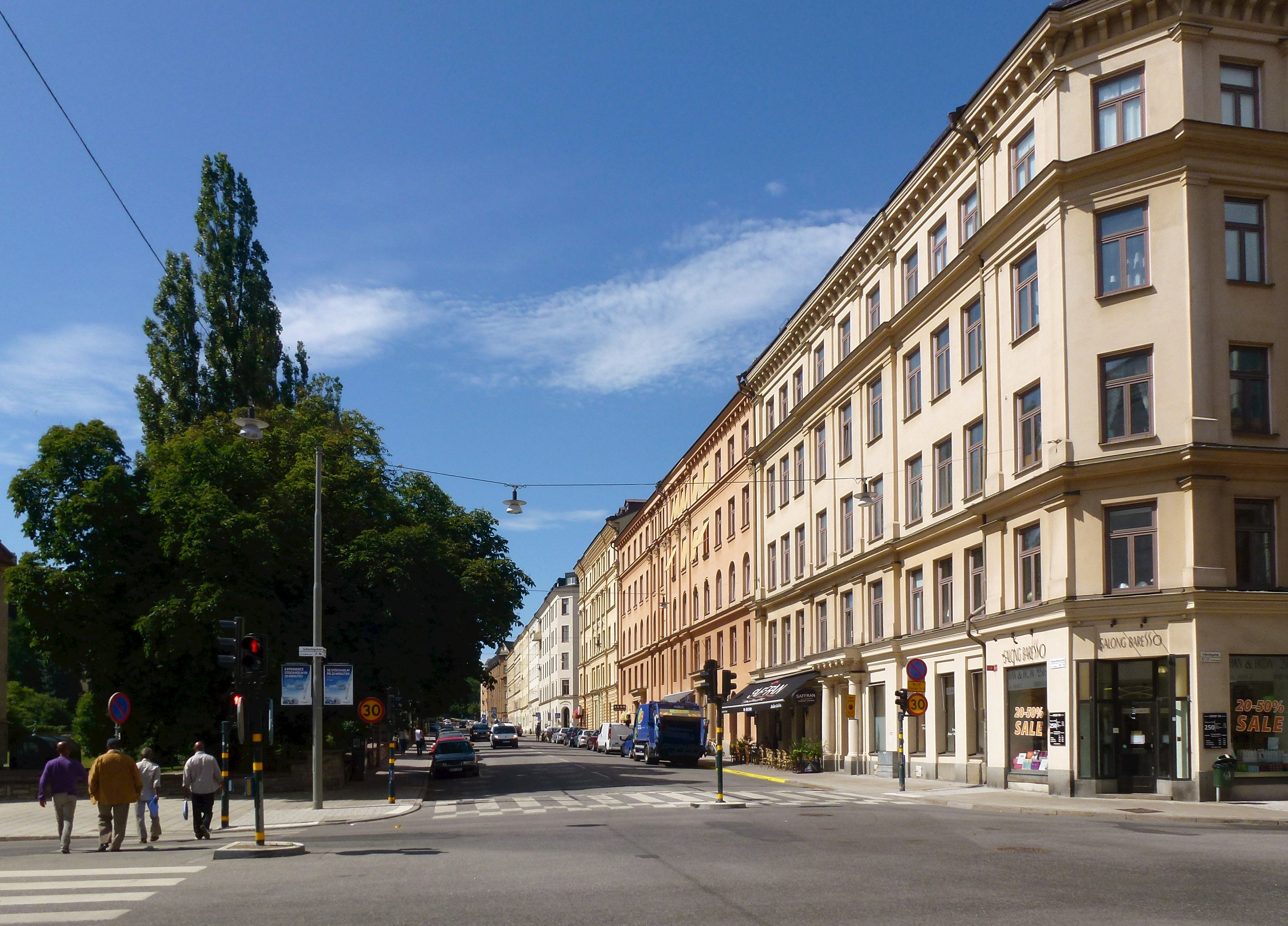 Kungsholmsgatan mot väst, hörnet Scheelegatan